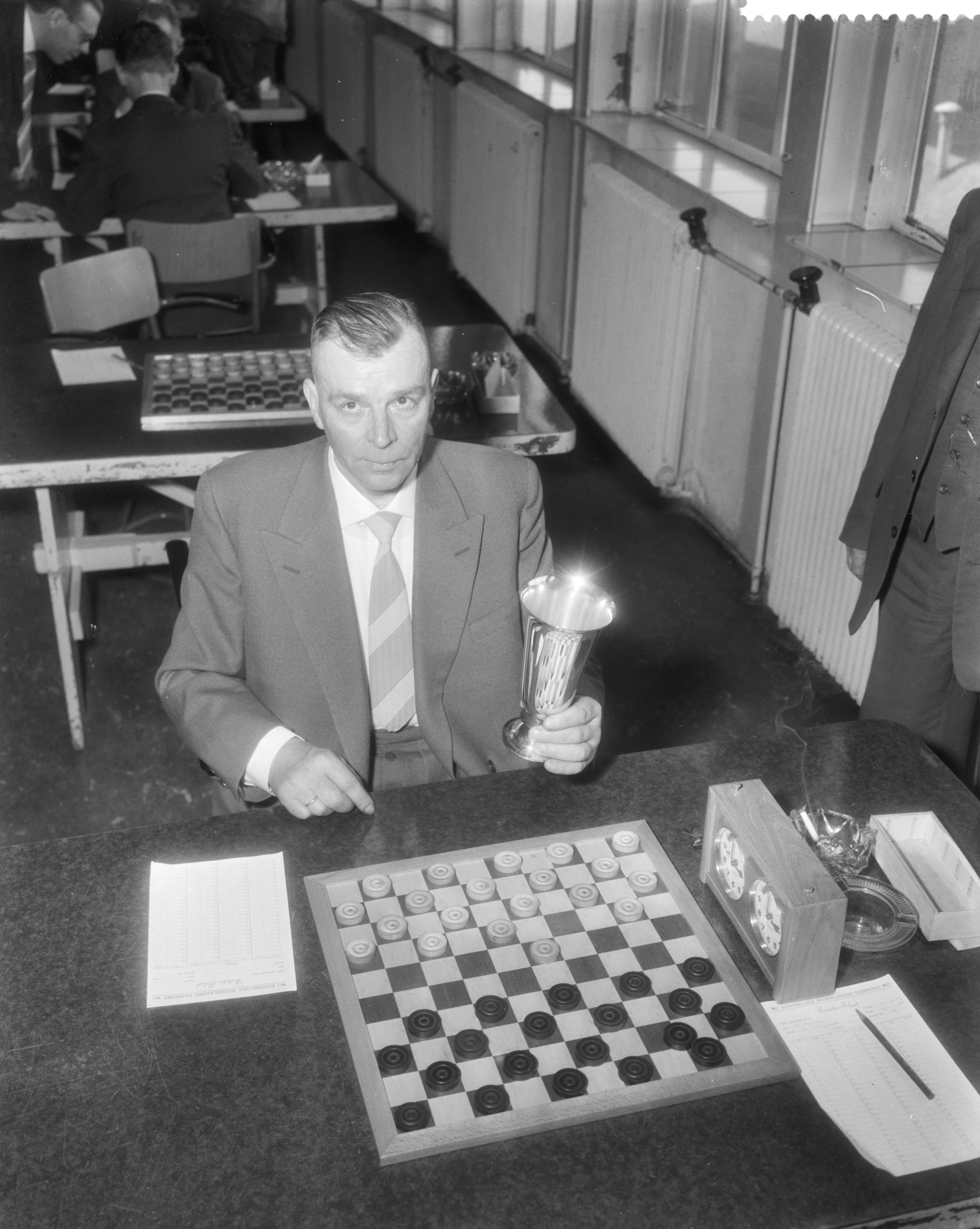 Collectie / Archief : Fotocollectie Anefo Reportage / Serie : [ onbekend ] Beschrijving : Laatste wedstrijd om het persoonlijke damkampioenschap van Nederland te Utrecht De Heer Dukel met de beker Datum : 28 februari 1959 Locatie : Utrecht Trefwoorden : DAMWEDSTRIJDEN Fotograaf : Pot, Harry / Anefo Auteursrechthebbende : Nationaal Archief Materiaalsoort : Negatief (zwart/wit) Nummer archiefinventaris : bekijk toegang 2.24.01.04 Bestanddeelnummer : 910-1863